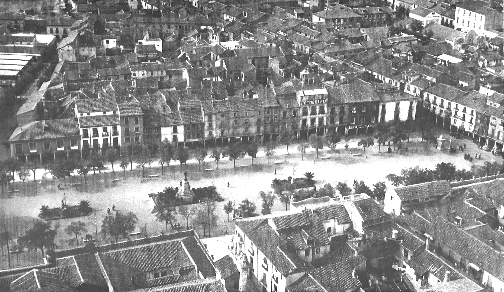 Vista aérea de la Plaza de Cervantes de Alcalá de Henares (Comunidad de Madrid - España). En ella se observa la Estatua de Miguel de Cervantes.